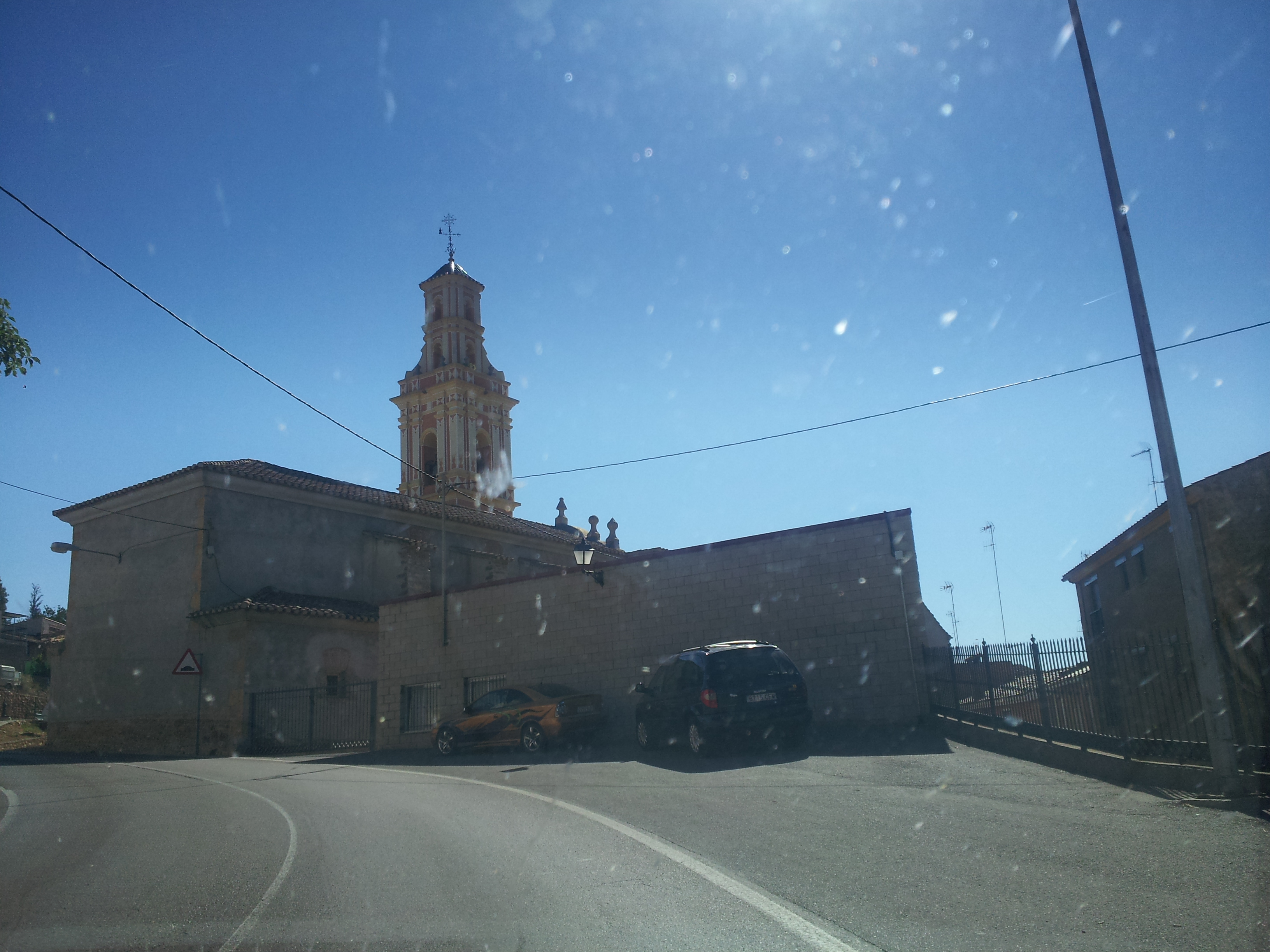 Artesa, pedania d'Onda.